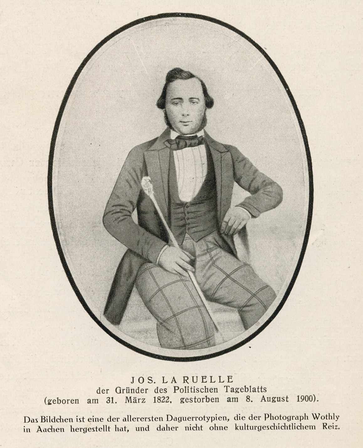 Joseph La Ruelle, Daguerreotypie